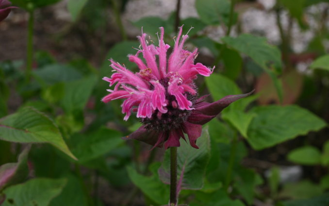 Monarda didyma: Flowers